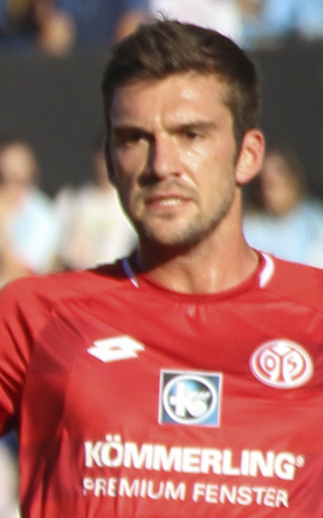 Partido disputado en los aledaños del Estadio de Balaidos, siendo el partido de presentación para el Celta ante su afición para la temporada 2018/2019